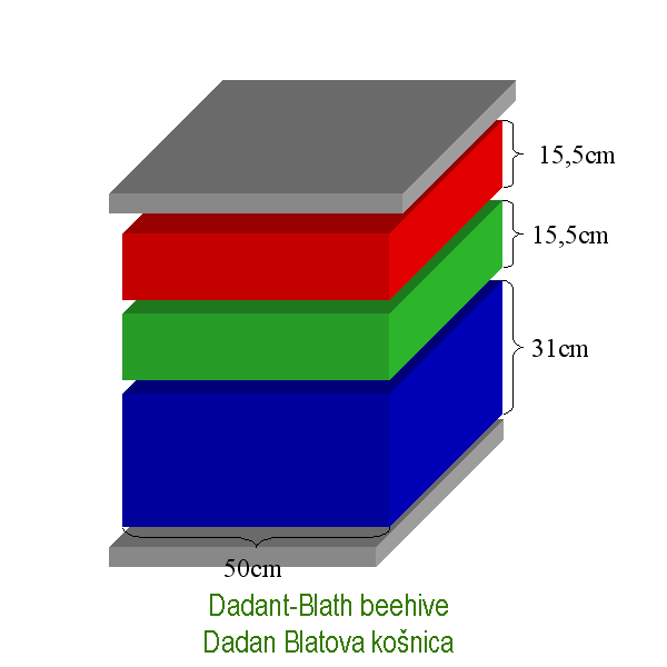 Dadan Blatova košnica